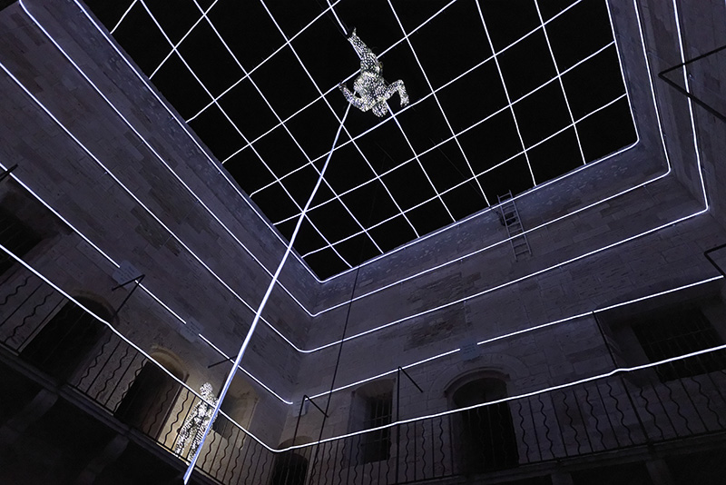 Migrations, Groupe F, Chateau d'if, 2013